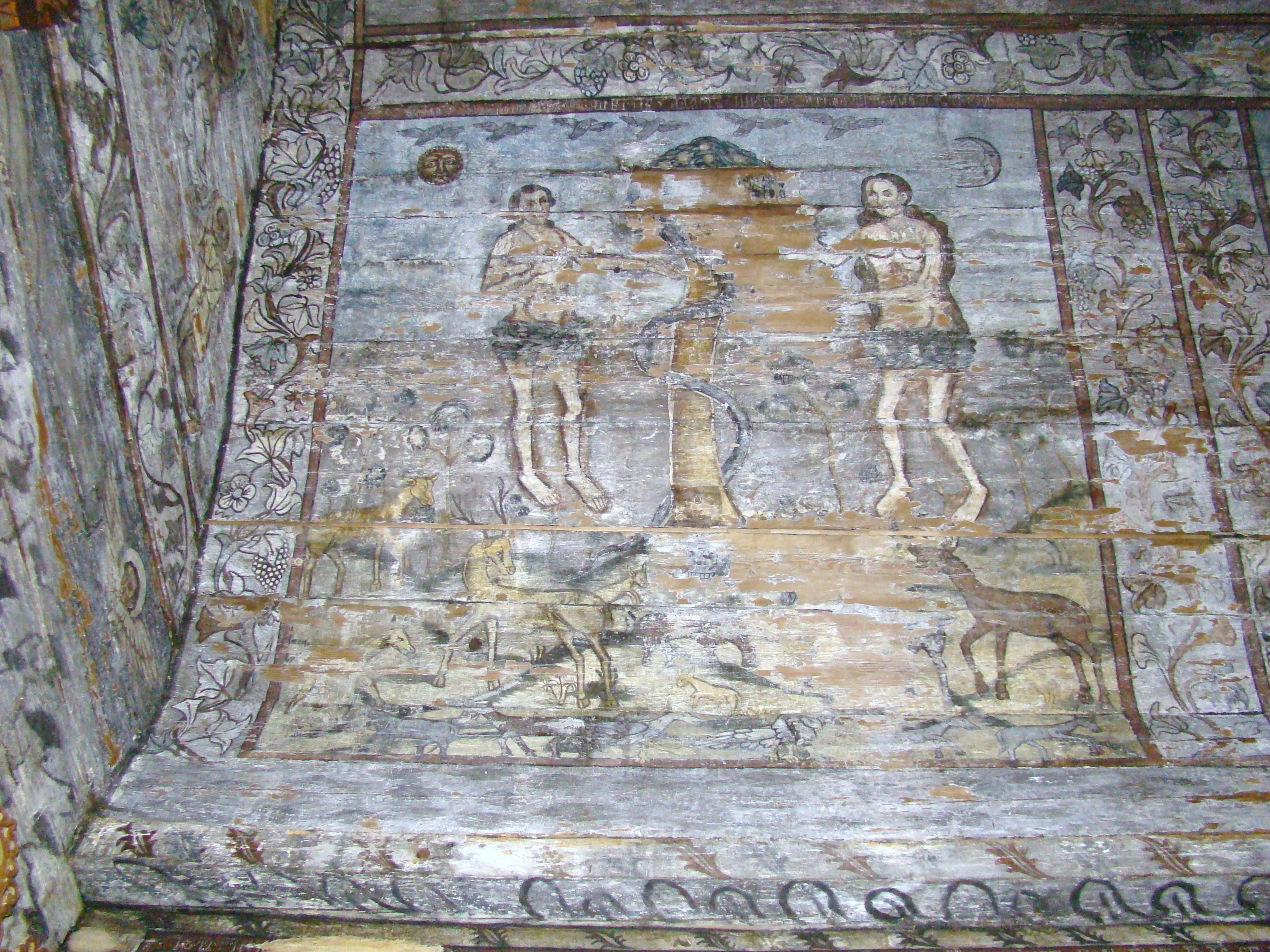 Biserica de lemn "Sfântul Nicolae", sat BOGDAN VODĂ